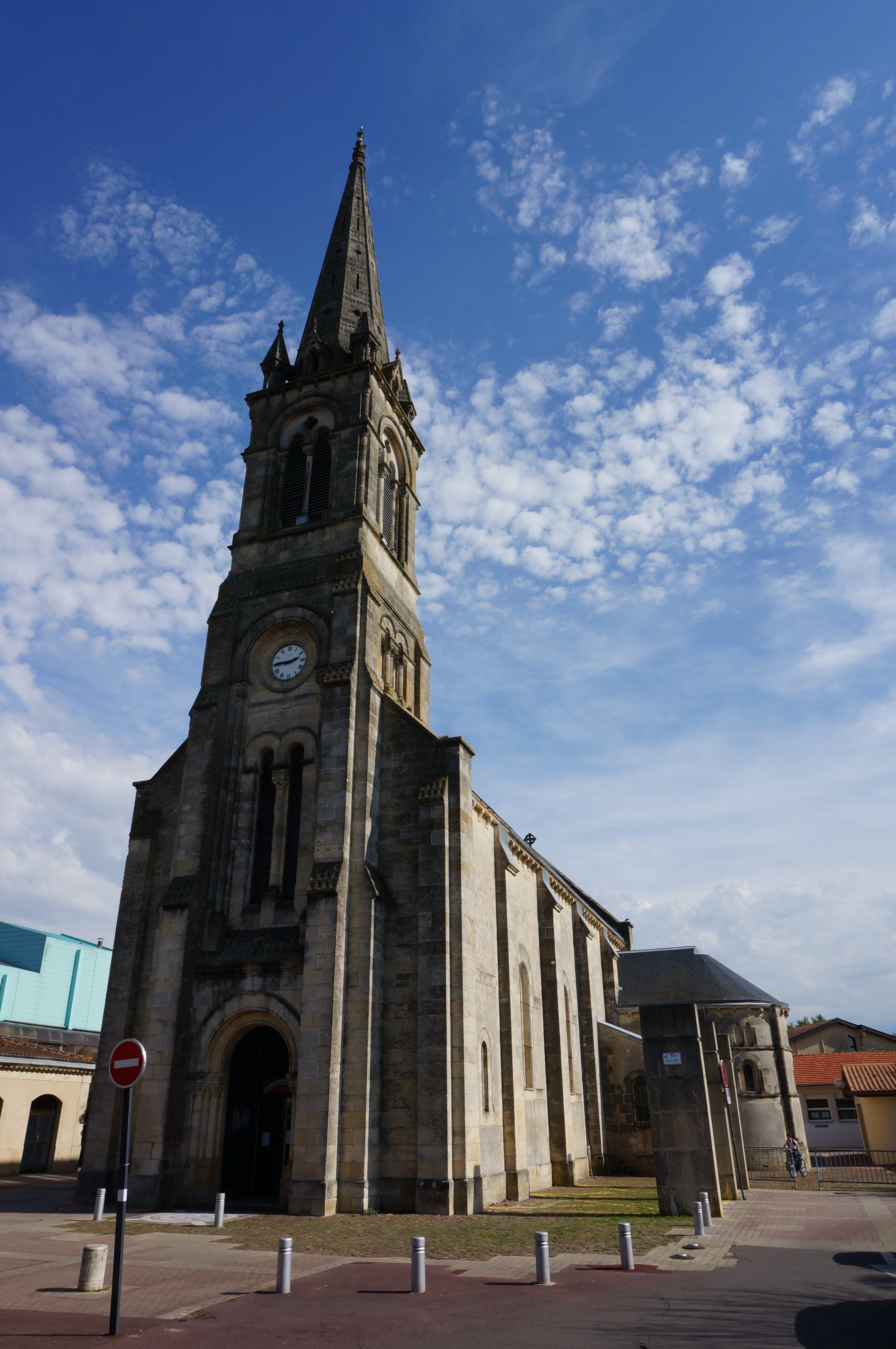 Église Notre-Dame de la Merci au Haillan, Gironde.